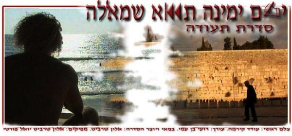 כרזת הסדרה ירושלים ימינה ת"א שמרלה